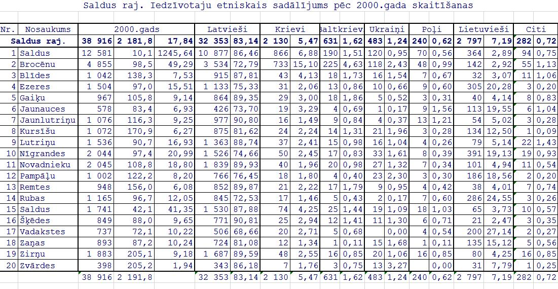 результаты переписи населения Латвии ни 01.04.2000